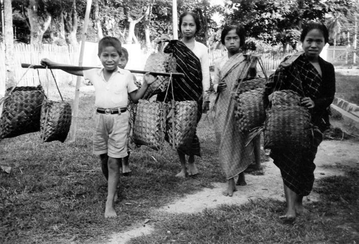 Negatief. Drie vrouwen en twee jongens uit Mandar, West-Sulawesi, verkopen houtskool (arang)